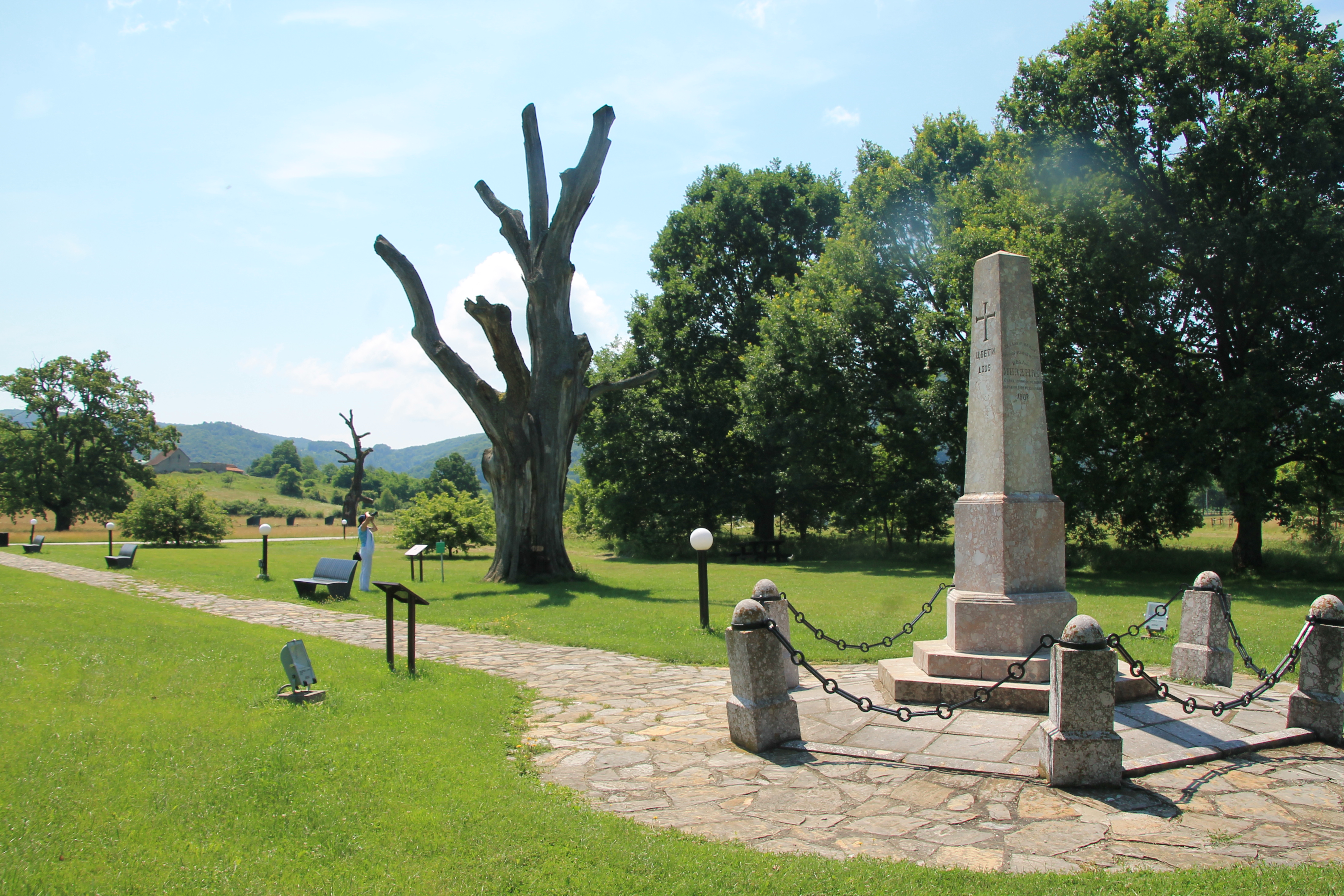 Spomen-kompleks Drugi srpski ustanak